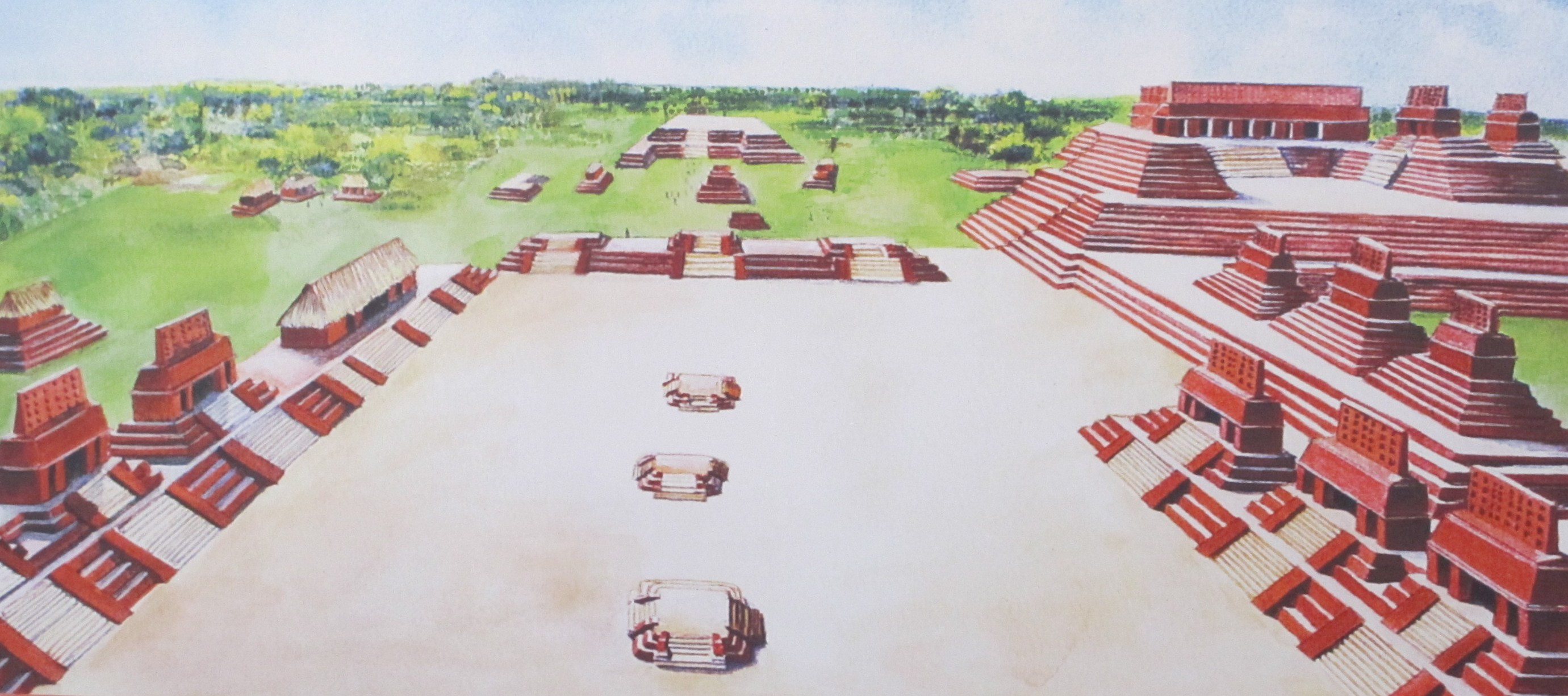 Recreación digital de la Plaza Norte vista desde la cima del Templo I. En la parte superior derecha se aprecian los edificios de la Gran Acrópolis entre los que destaca El Palacio.